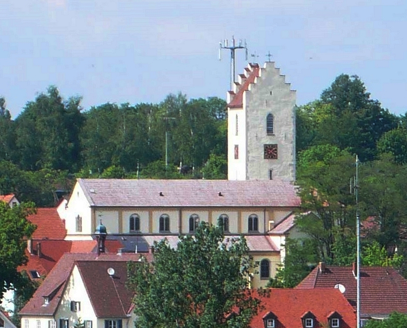 Kath. Kirche St. Silvester, Emmingen